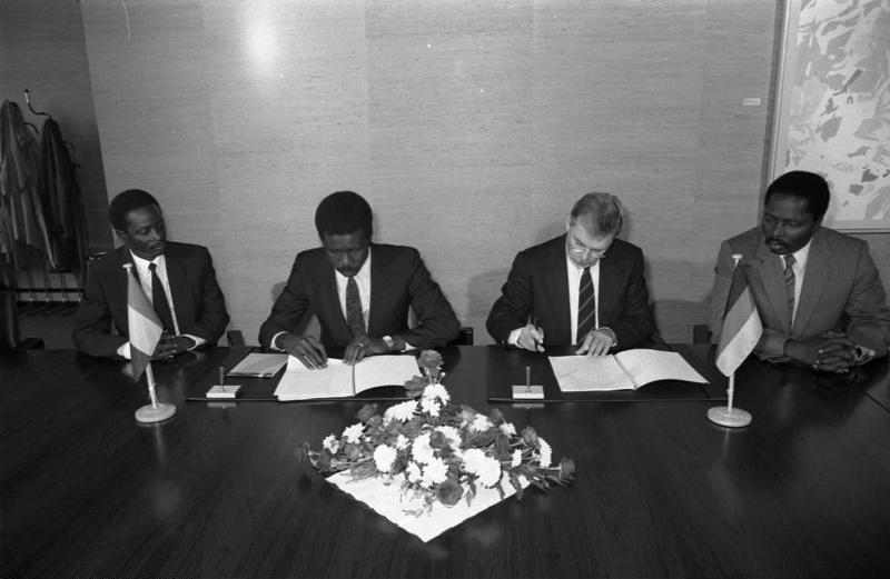 23.10.1986 Unterzeichnung des Regierungsaabkommens zwischen der Bundesrepublik Deutschland und Guinea durch MD Dr. Wolf Preuss, UAL im Bundesministerium für wirtschaftliche Zusammenarbeit und Entwicklung, und den Minister für Planung und internationale Zusammenarbeit von Guinea, Edouard Benjamin im Bundesministerium für wirtschaftliche Zusammenarbeit und Entwicklung. Außerdem anwesend: Der Minister für menschliche Ressourcen (Industrie, Klein-und Mittelbetriebe) von Guinea, Kemoko Keita und der guineische Botschafter in Bonn, Alkhaly Bangoura.